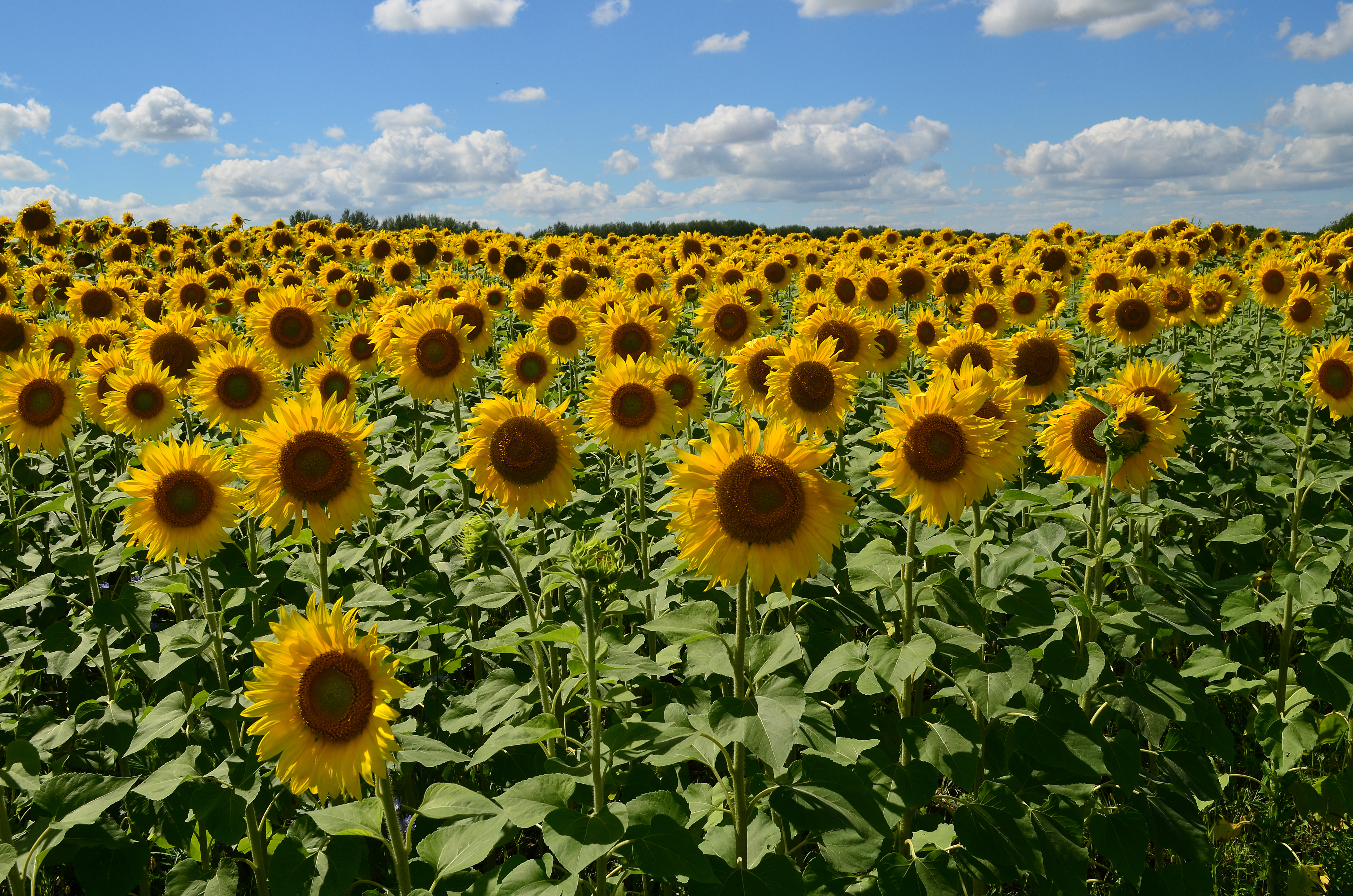 Поле подсолнечника в Александро-Невском районе Рязанской области.